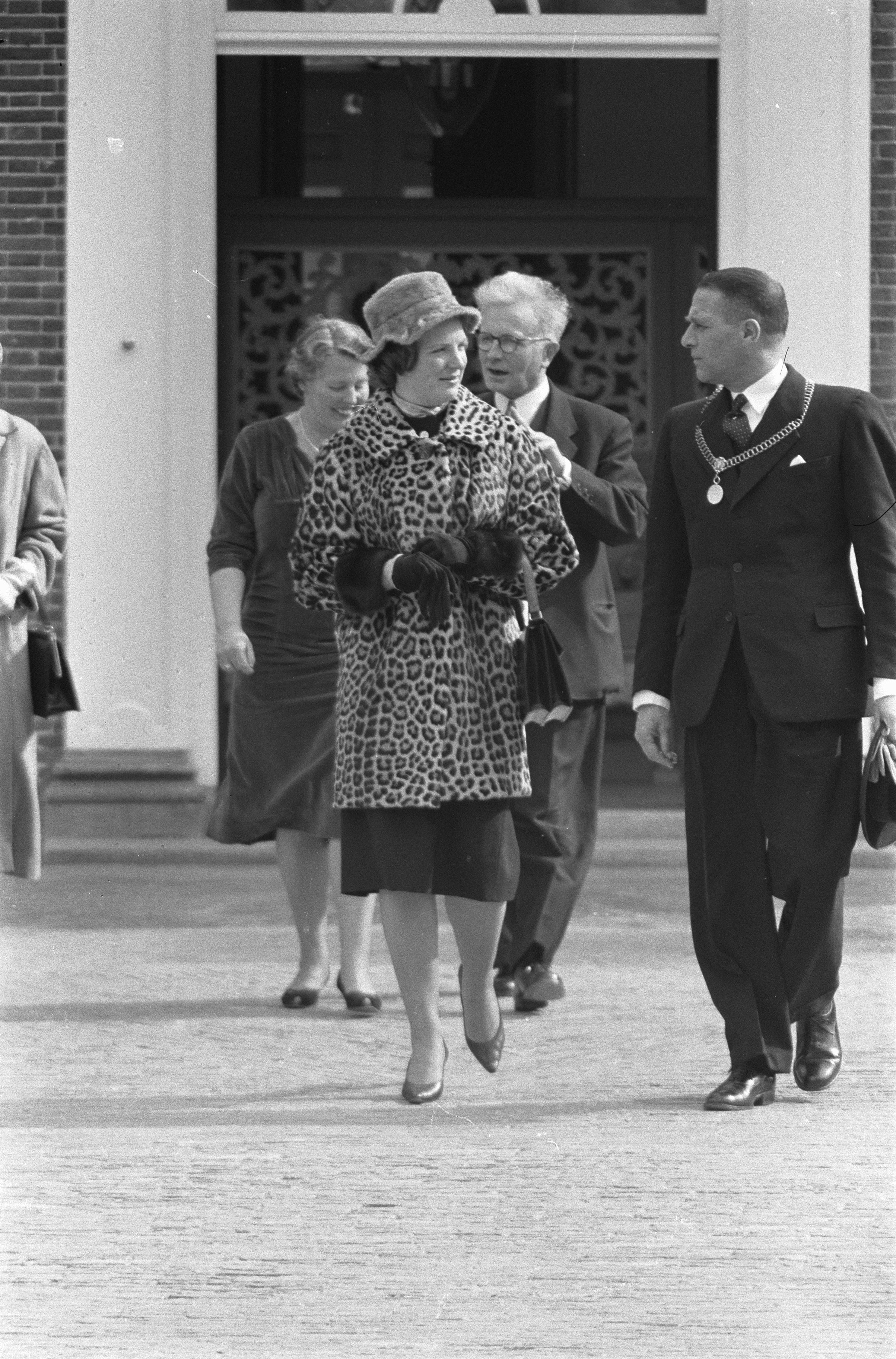 Collectie / Archief : Fotocollectie Anefo Reportage / Serie : [ onbekend ] Beschrijving : Prinses Irene bezoekt Drenthe, bezoek aan de gemeente Annen Datum : 6 april 1960 Locatie : Drenthe Trefwoorden : bezoeken Persoonsnaam : Irene, prinses Fotograaf : Rossem, Wim van / Anefo Auteursrechthebbende : Nationaal Archief Materiaalsoort : Negatief (zwart/wit) Nummer archiefinventaris : bekijk toegang 2.24.01.05 Bestanddeelnummer : 911-1492